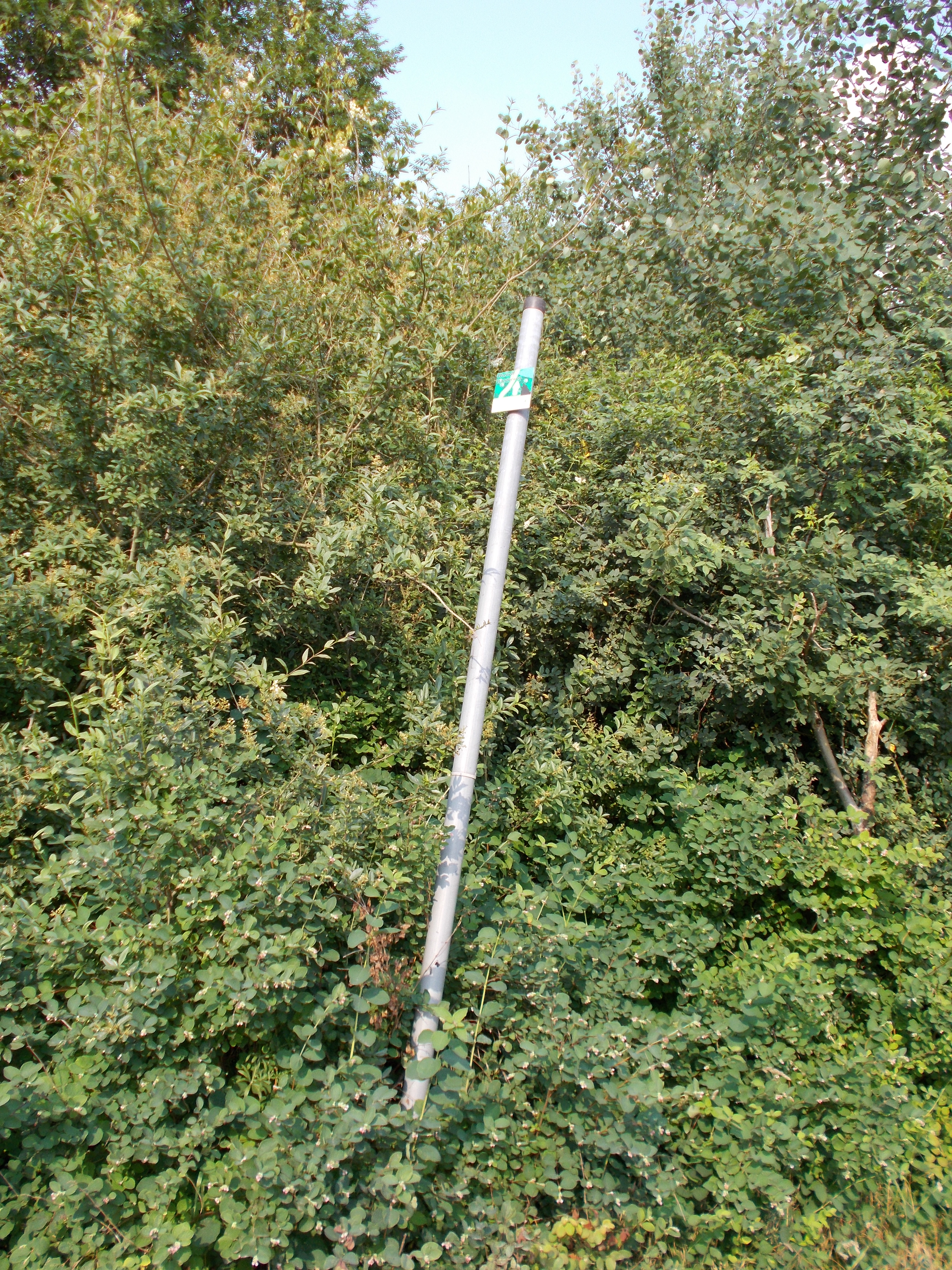 Die Wegmarken befinden sich, sofern vorhanden, an den unmöglichsten Stellen. z.B. wie hier, gut getarnt, an einer 3,5m langen Stange.